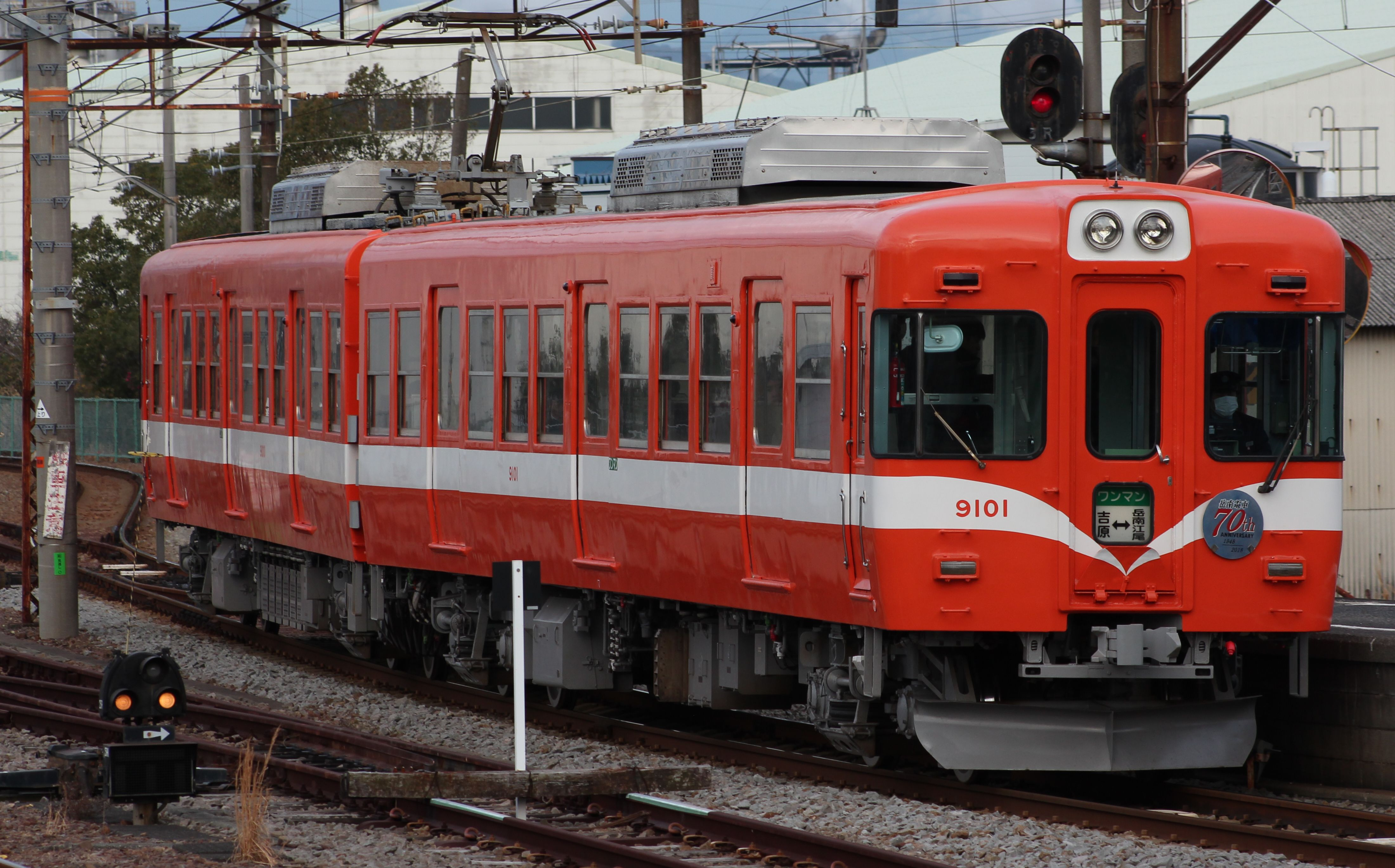 Gakunan 9000